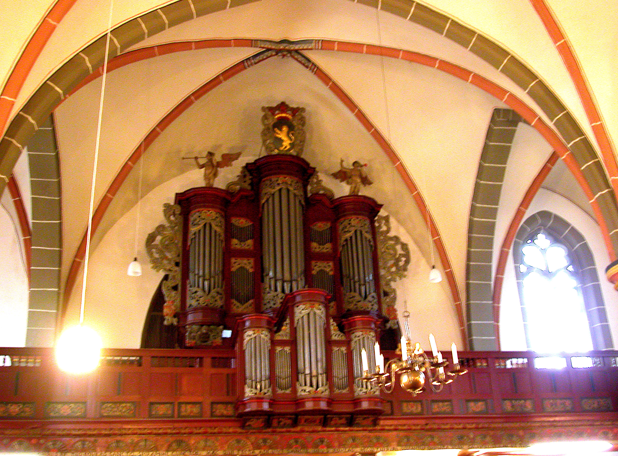 Orgel. Stadtkirche St. Georg. Luenen (de); Орган в евангелической церкви св. Георга. Люнен (ru).